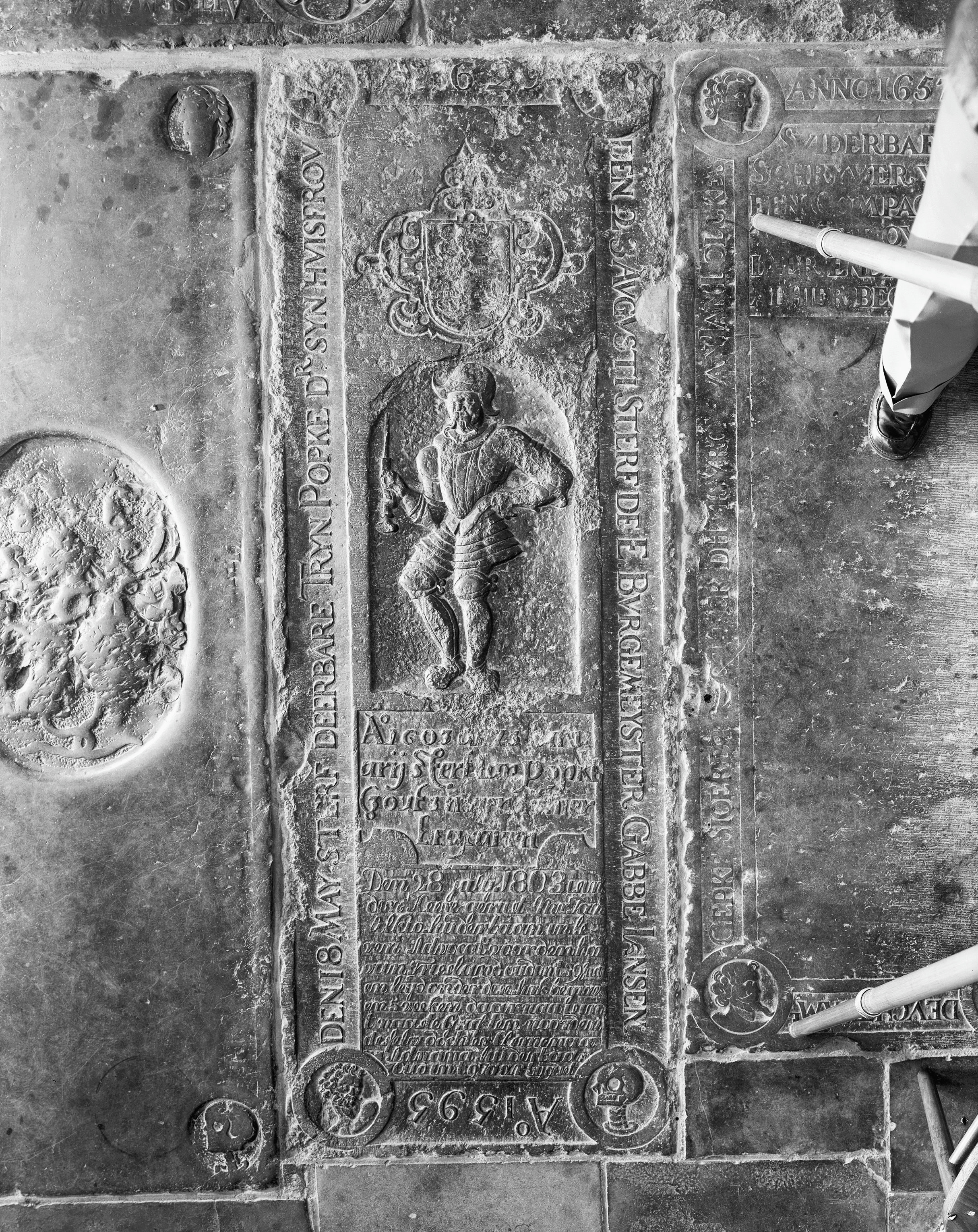 N.H.Kerk: Grafzerk Jan Popke (+ 1603), Tryn Popke en Gabbe Jans, burgemeester (+ 1629) - inscriptie: A° 1595 DEN 18 MAY STERF DEERBARE TRYN POPKE DR ZYN HVISFROV - DEN 23 AVGUSTI STERFDE E BVRGEMEYSTER GRABBE JANS